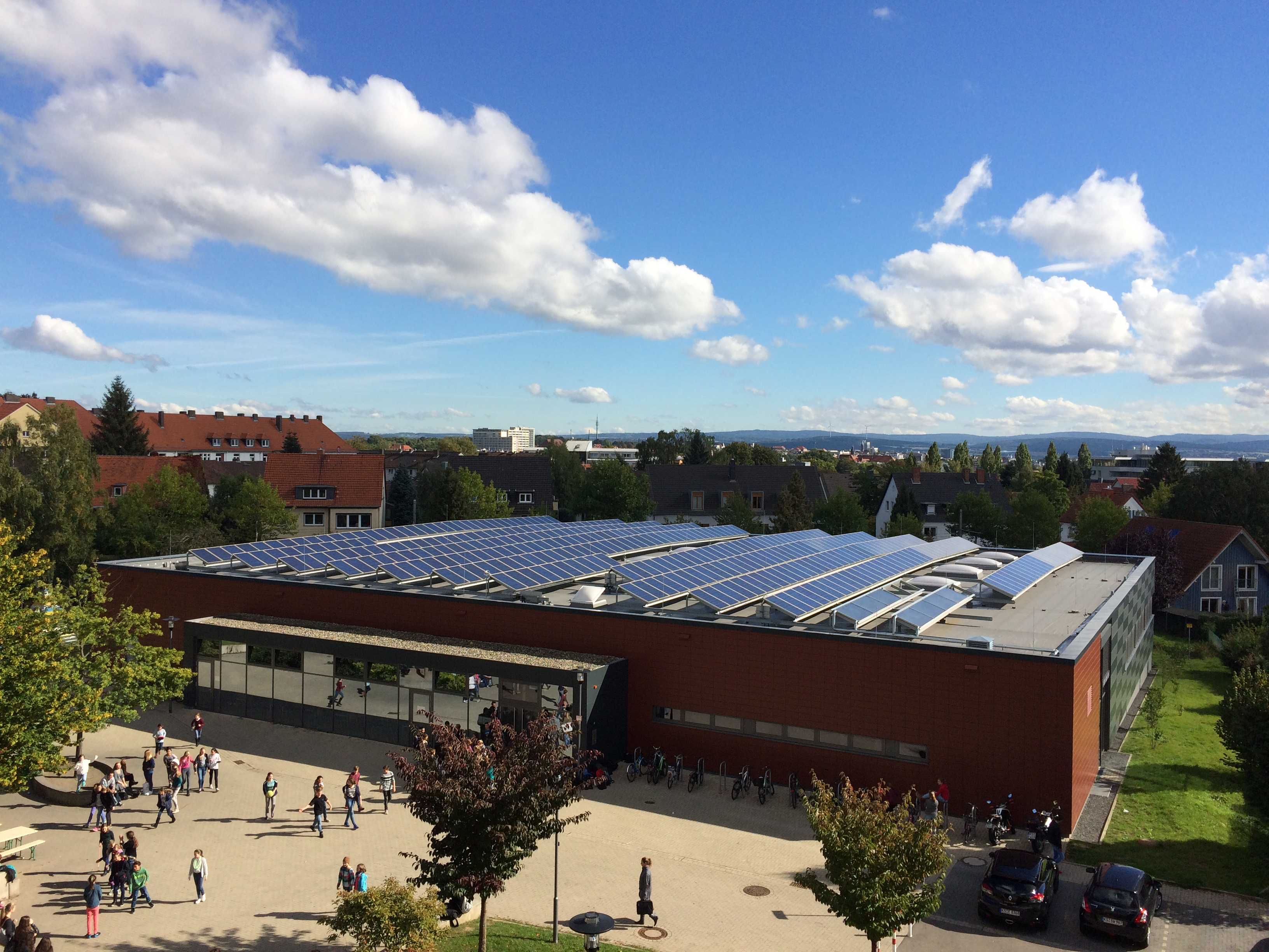 Blick aus den Musikräumen des Wilhelmsgymnaisums auf die Sporthalle Bad Wilhelmshöhe während einer großen Pause